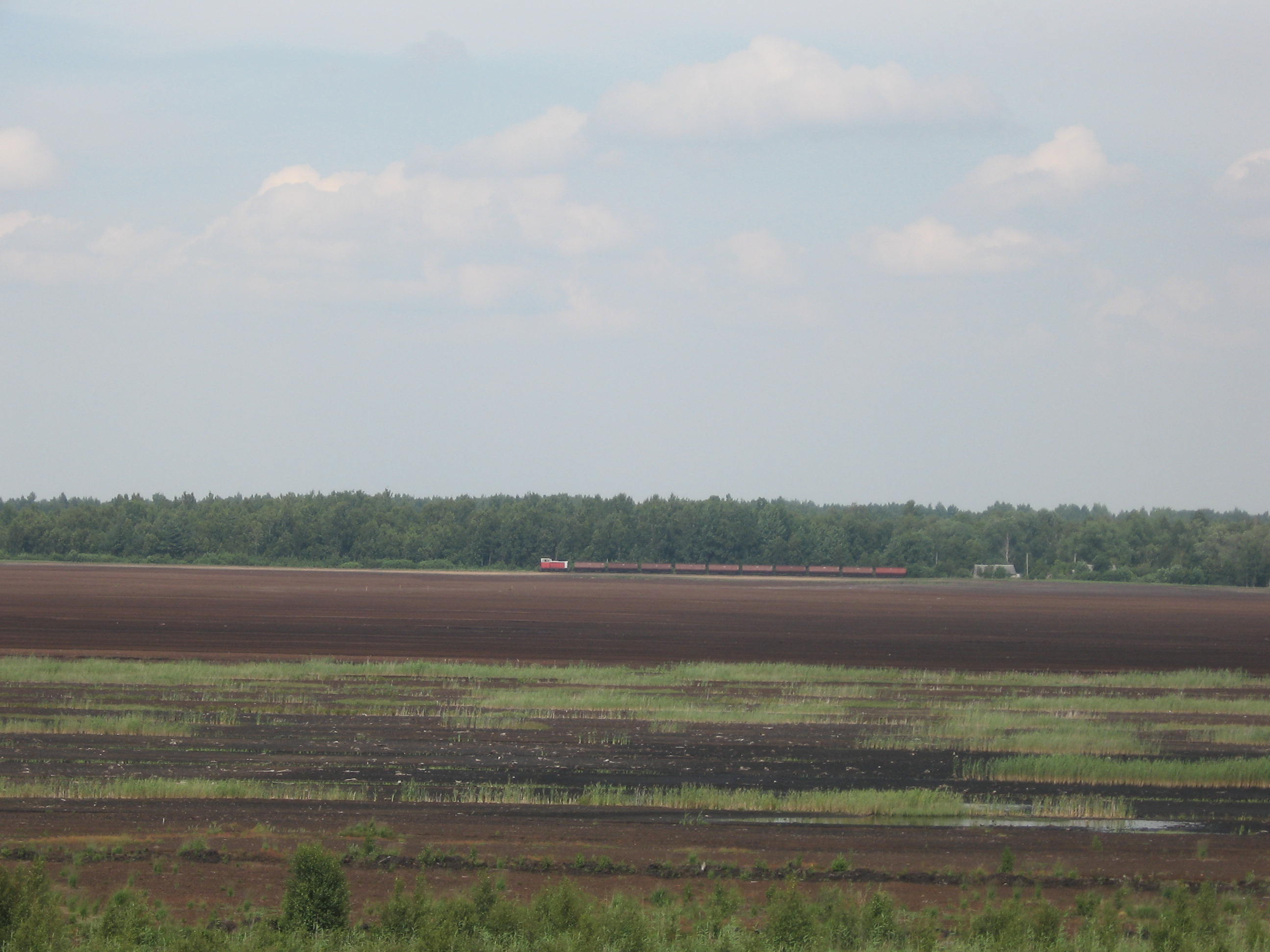 Durpynas Traksėdžiuose